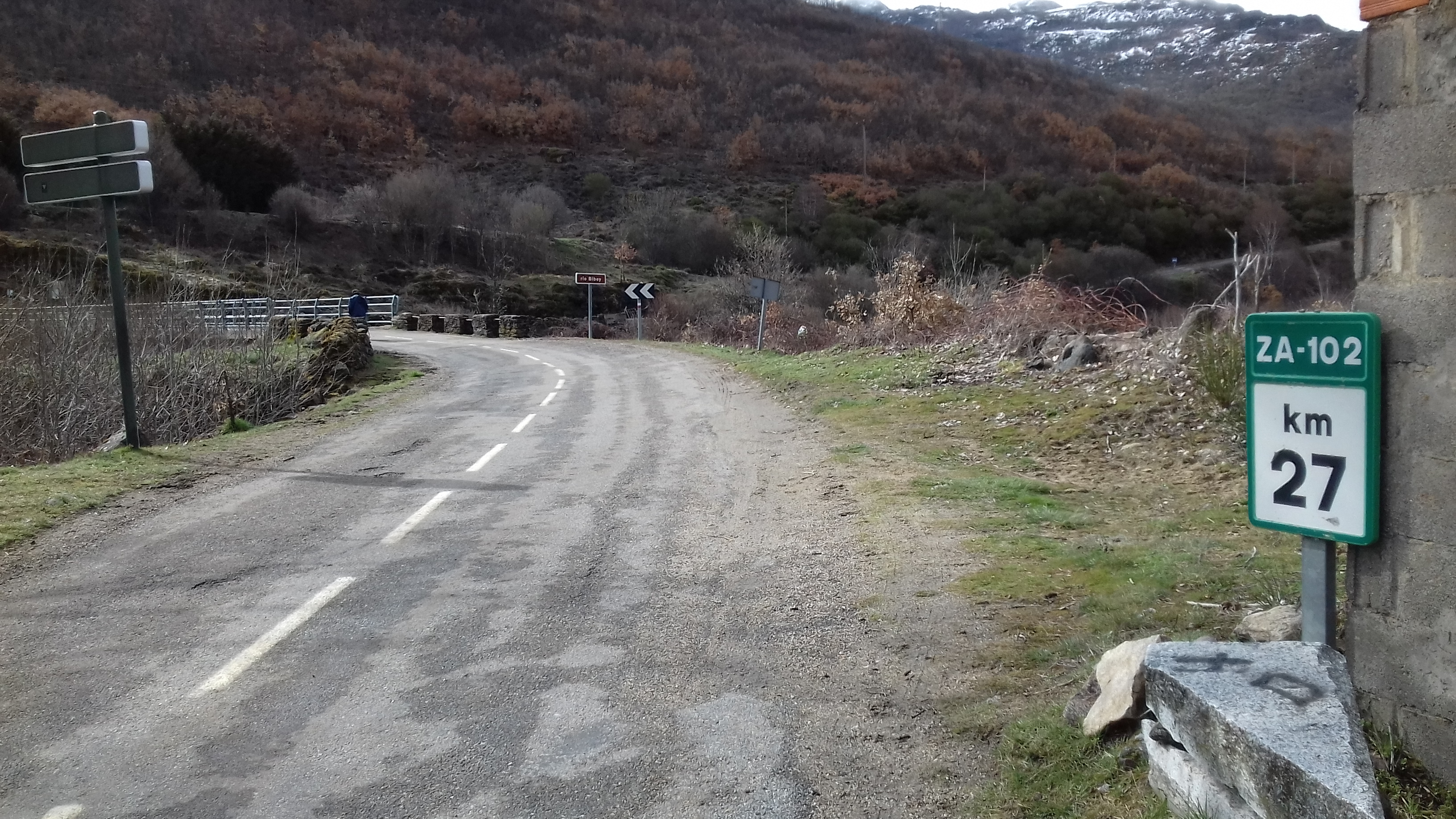 Estrada ZA-102 en Porto de Seabra, coa ponte sobre o río Bibei